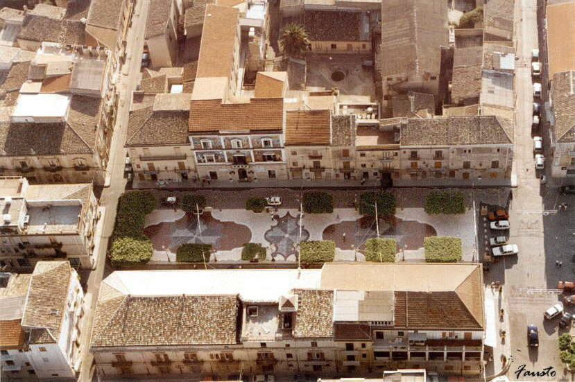 Foto aerea della piazza XX Settembre di Campobello di Licata